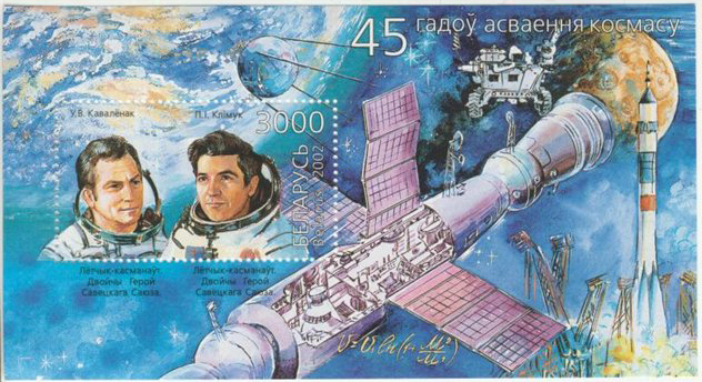 Почтовая марка Белоруссии - космонавты Ковалёнок и Климук, Герои Советского Союза